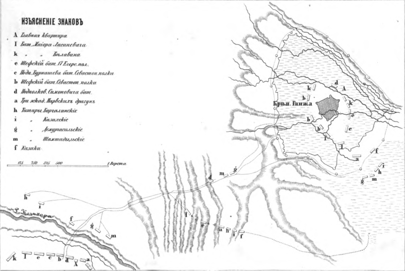 Движение русских войск из лагеря при реке Кочхор до форштадта крепости Ганжи 2 декабря